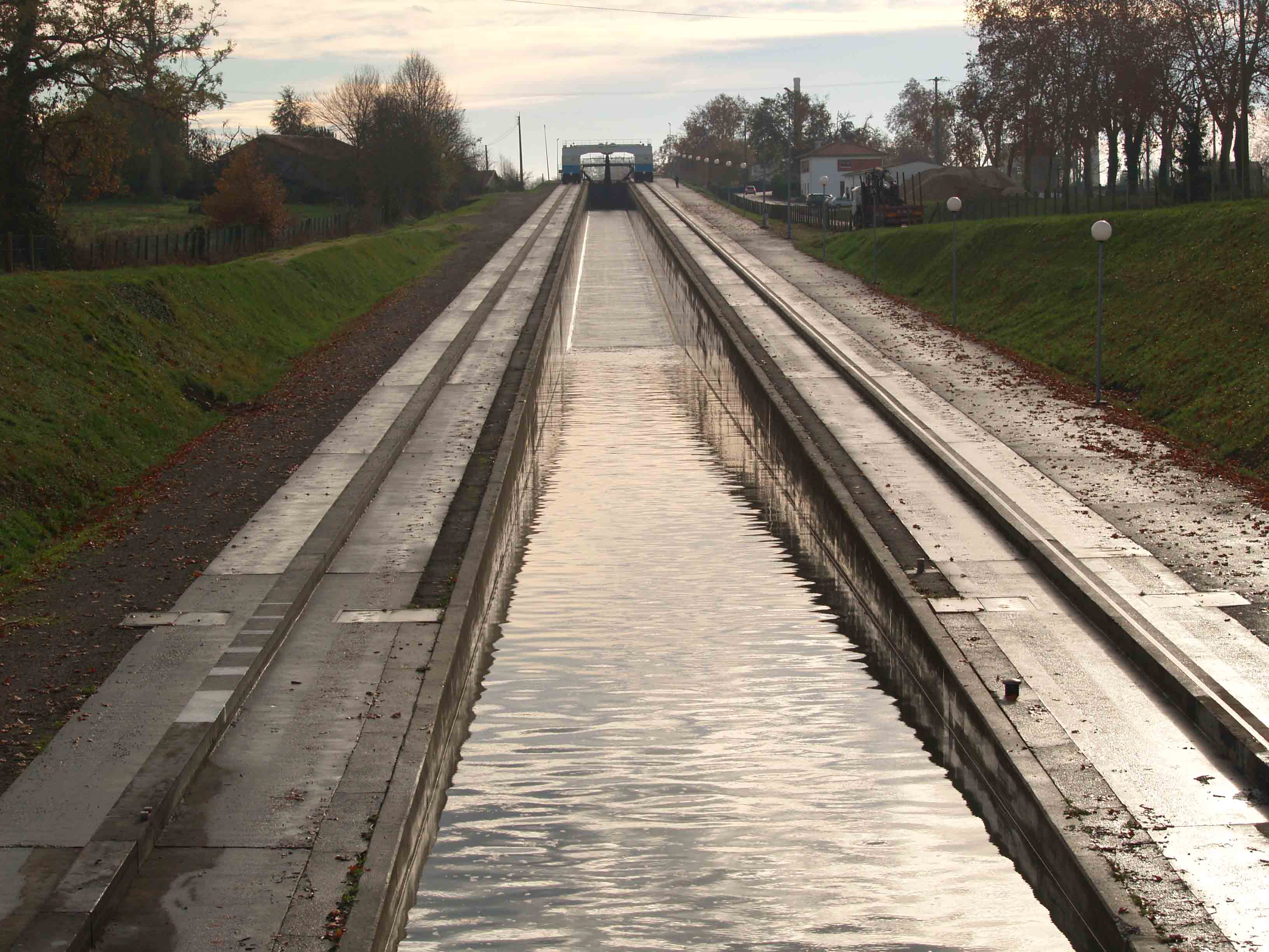 Pente d'eau de Montech Photo personnelle Bertrand Bouret